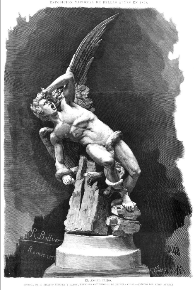 El Ángel Caído. Dibujo del autor de la escultura. Grabado de Arturo Carretero.